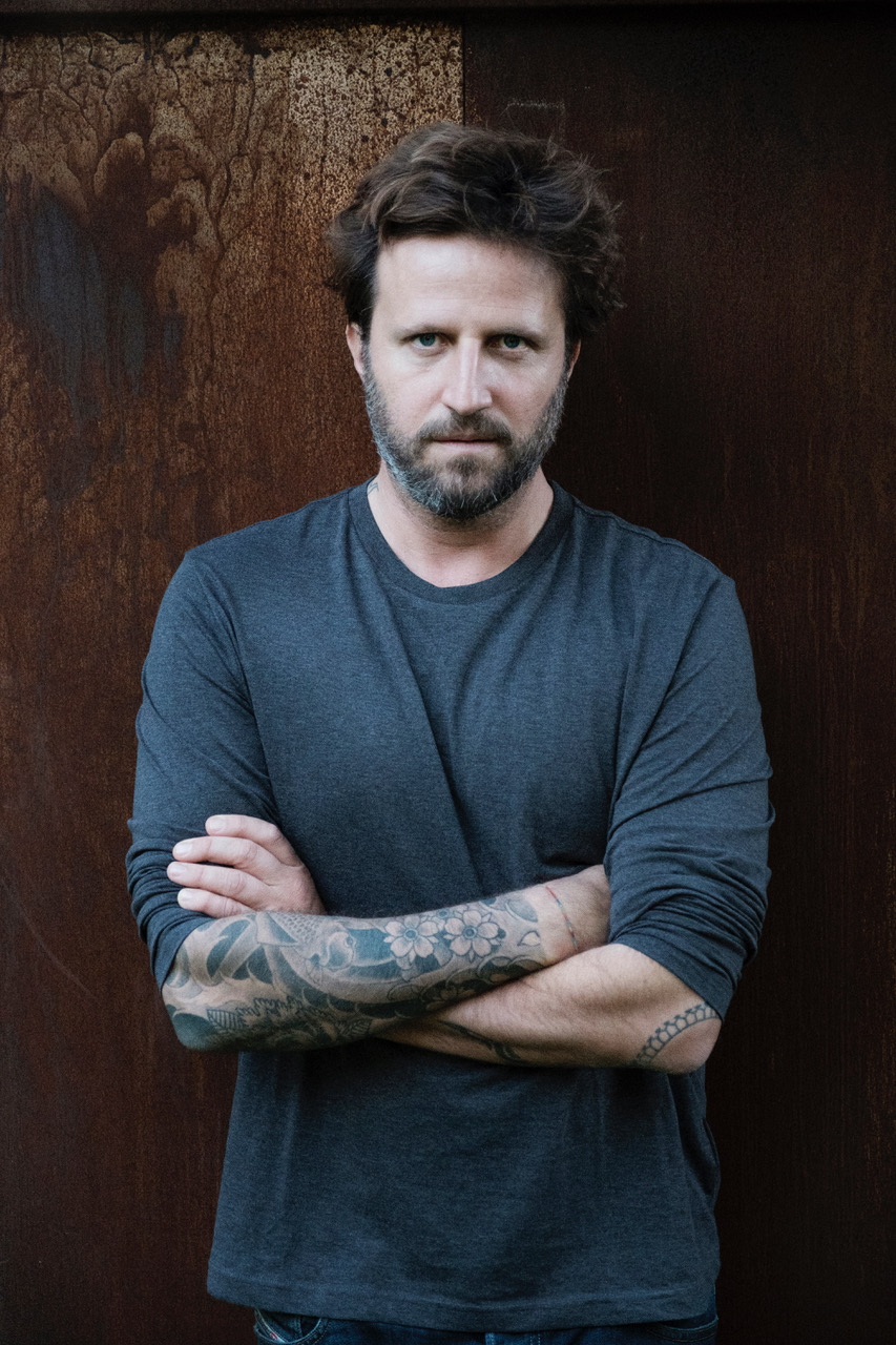 Nicola Tescari, 2018